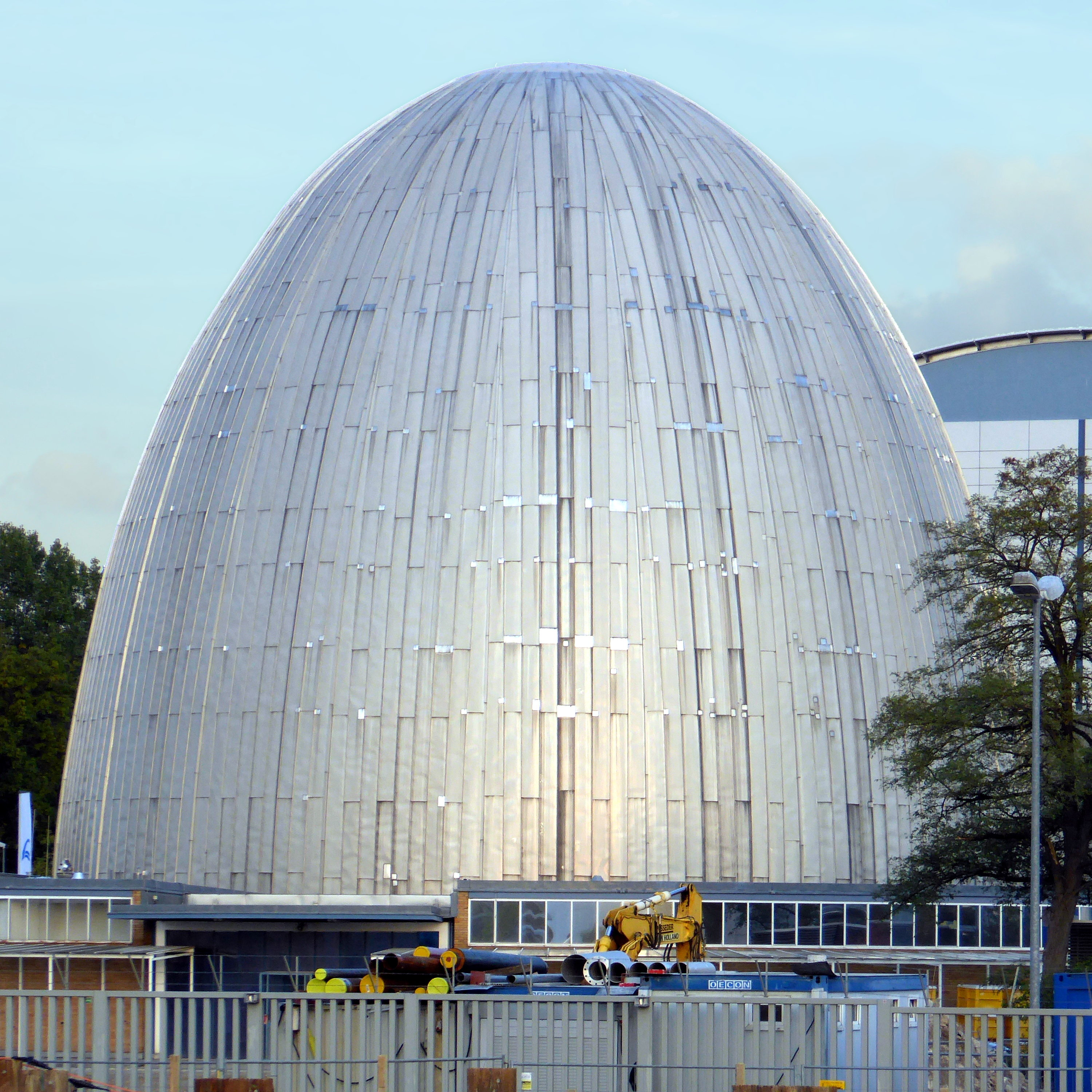 Die Kuppel des Forschungsreaktors München in Garching von Westen gesehen.